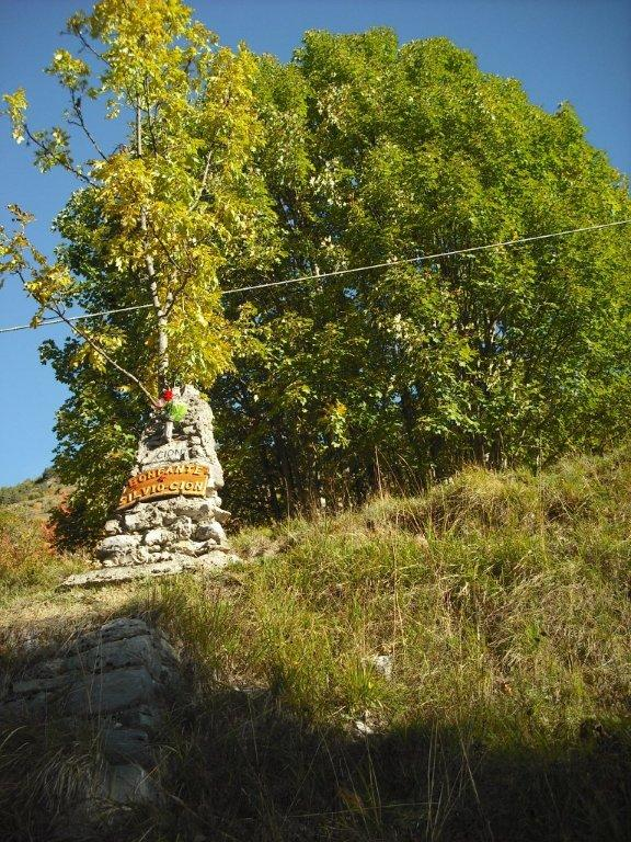 Cippo in memoria di Cion, all'entrata del paese di Upega, dove si tolse la vita per non cadere nelle mani dei nazifascisti.